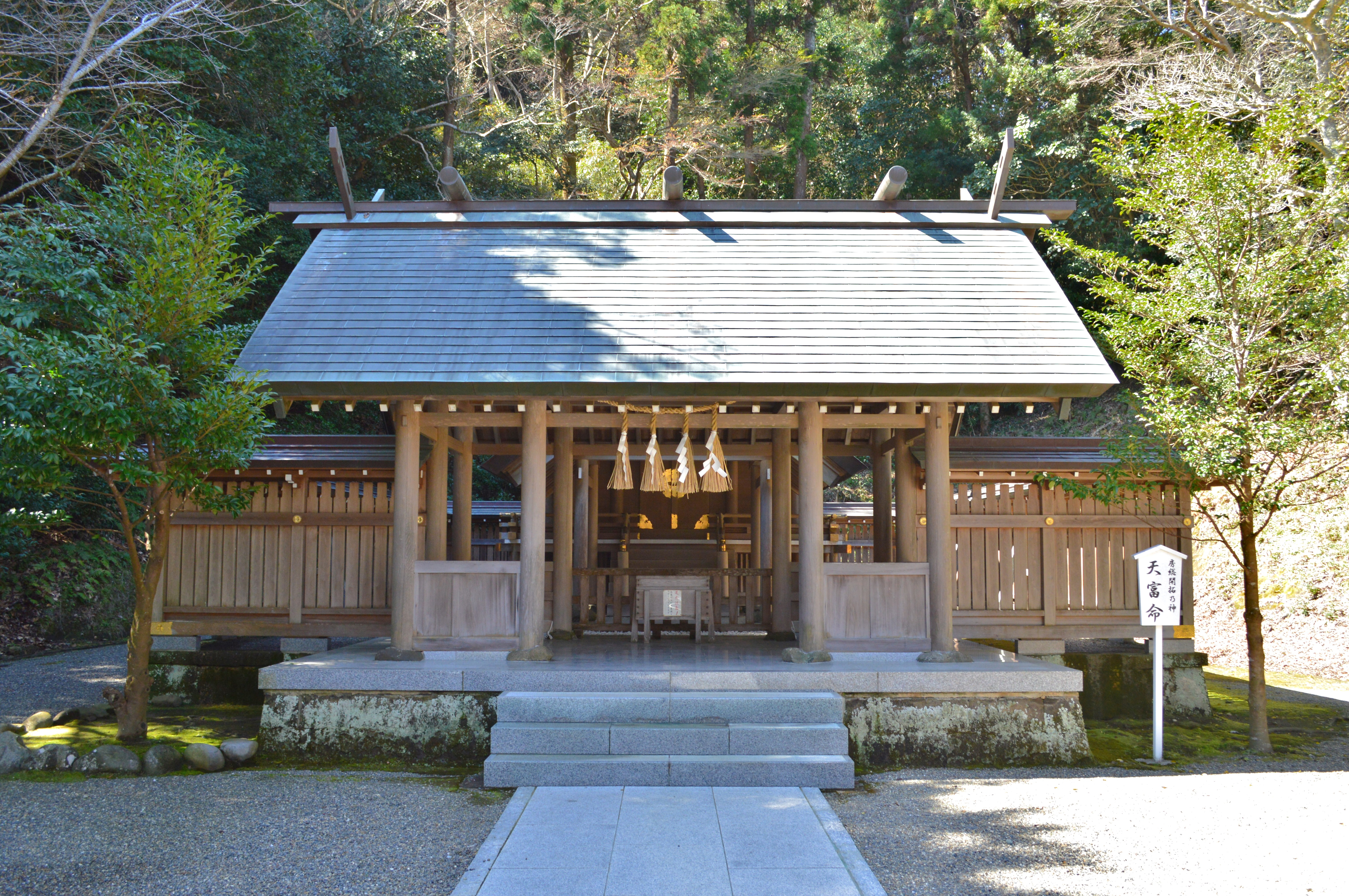 安房神社境内 下の宮